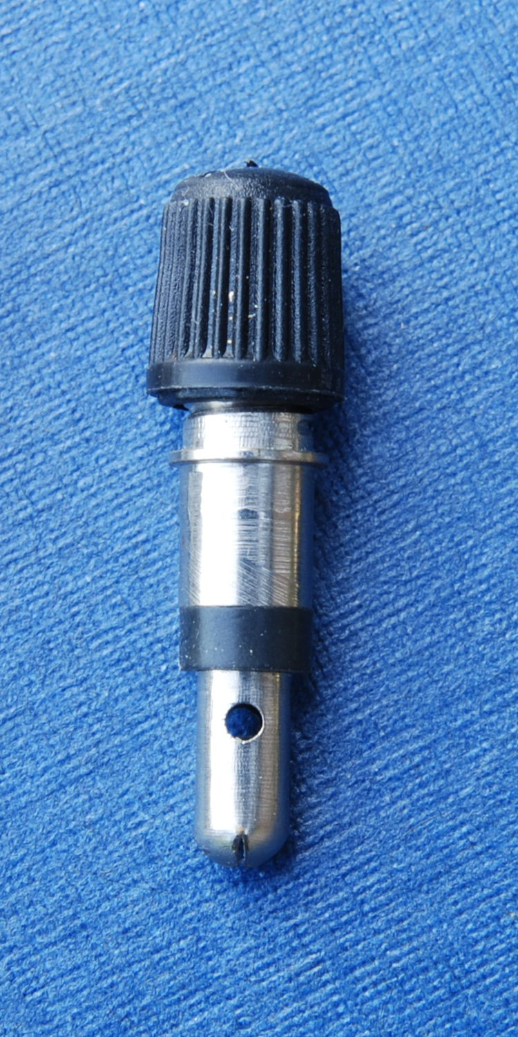 Blitzventil